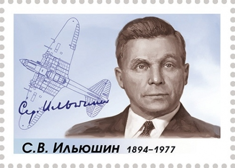 В почтовое обращение вышло 5 марок, посвящённых 125-летию со дня рождения авиаконструктора Сергея Владимировича Ильюшина.